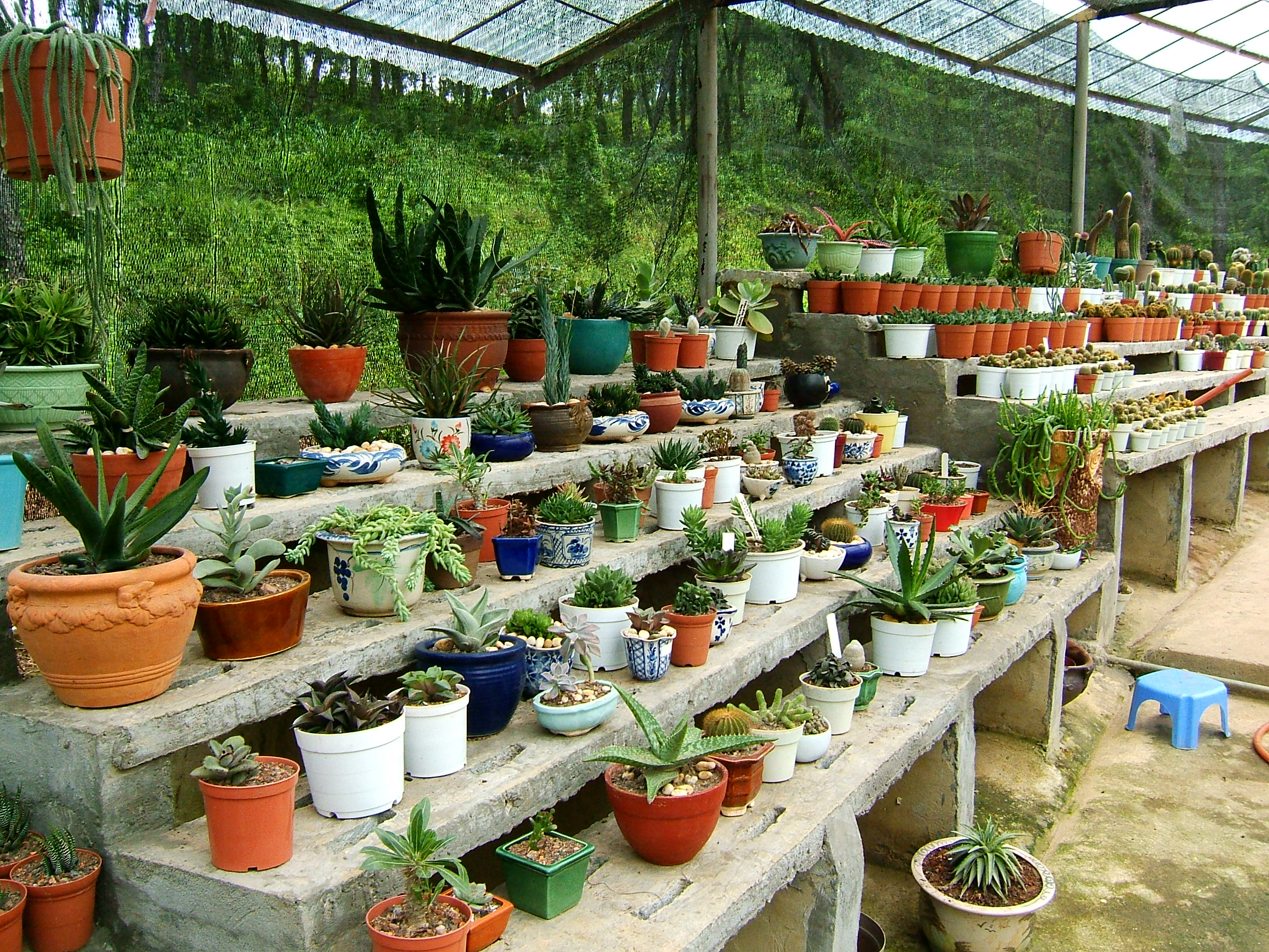 Xương rồng tại Vườn xương rồng trên Vườn quốc gia Ba Vì.